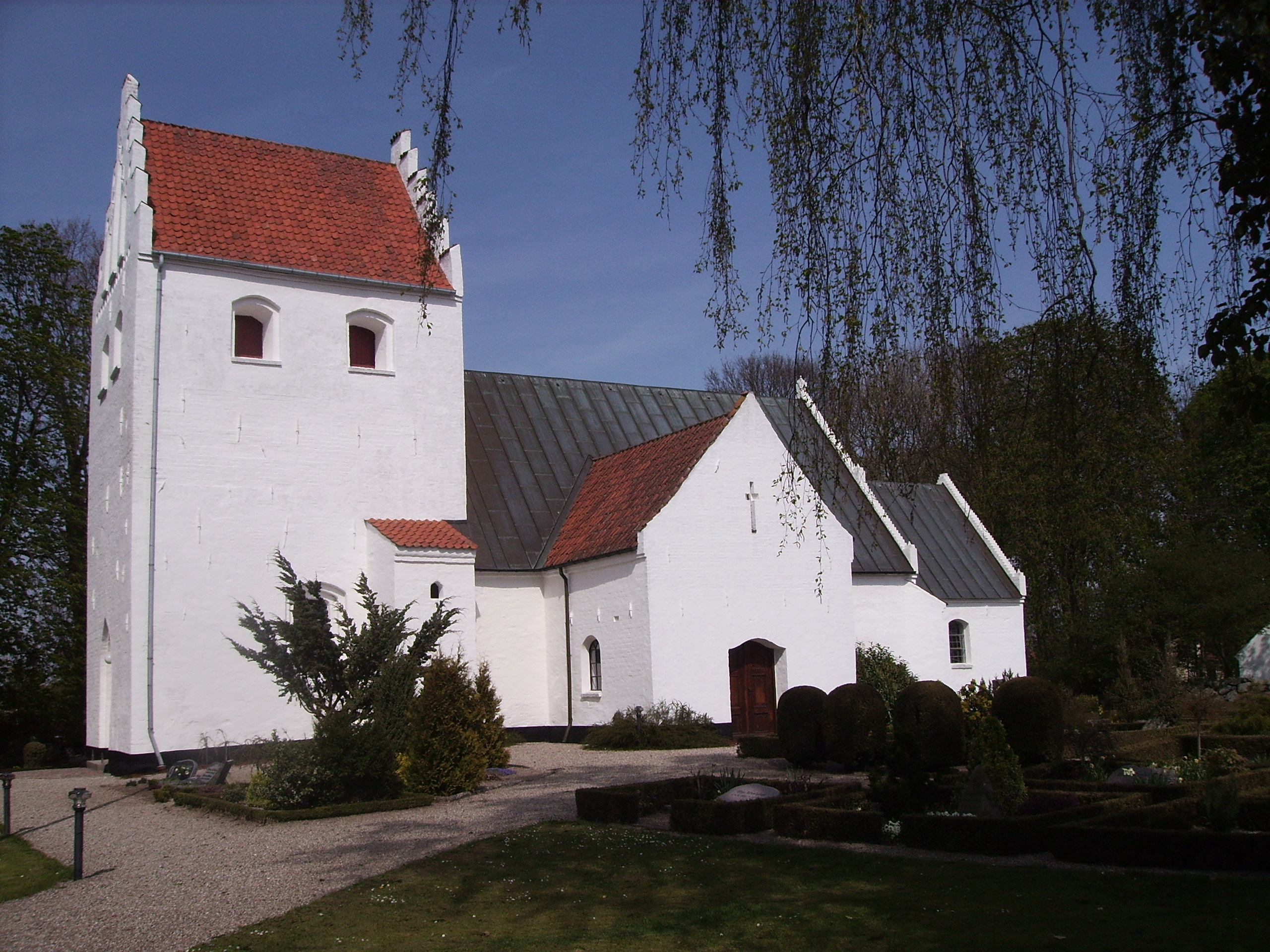 Allerup Kirke, Allerup Sogn, Åsum Herred, Odense Amt, Denmark (Danish Church) - Allerup Kirke fra sydvest